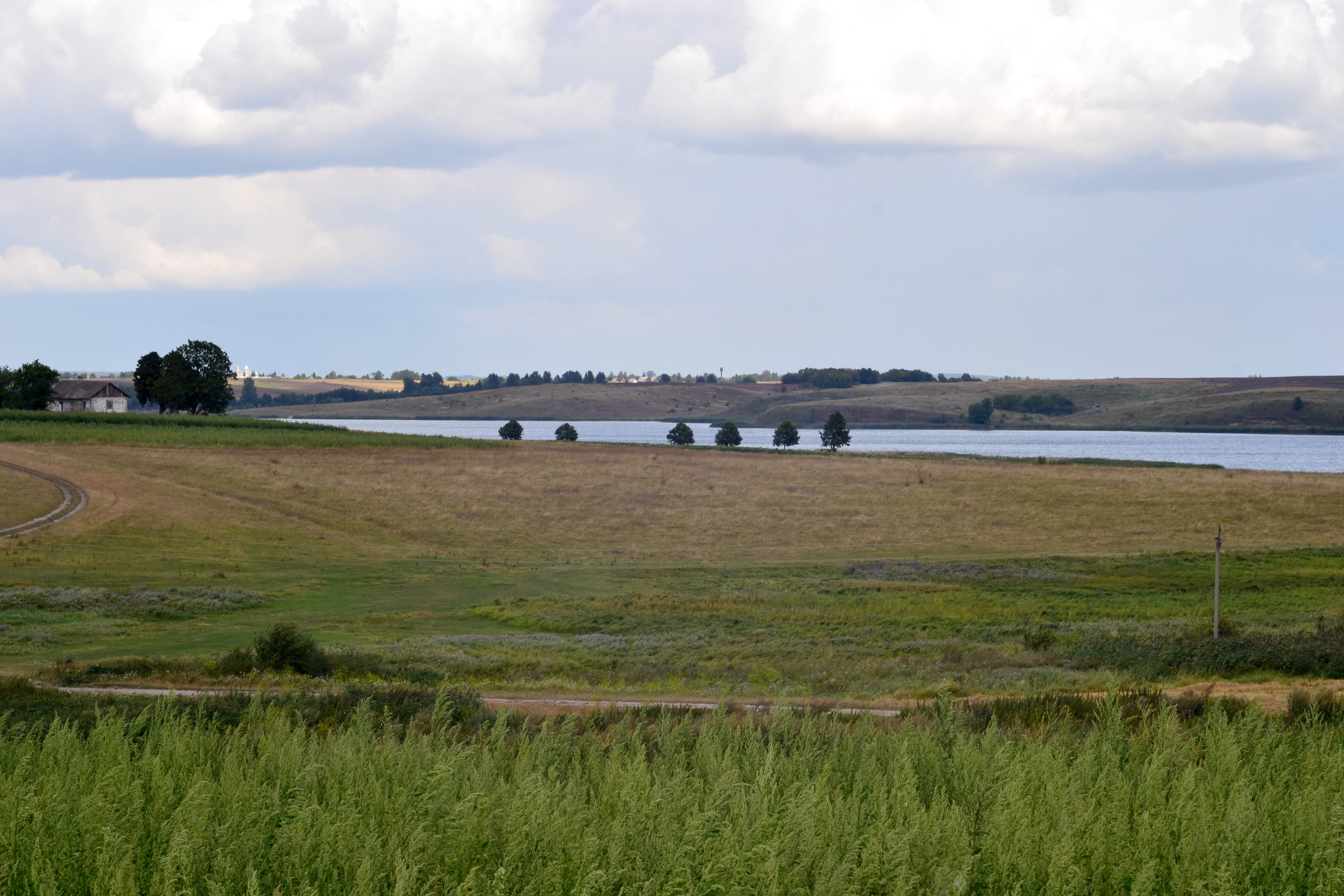 Старий Загорів-1, поселення одношарове стжижовської культури доби бронзи - Старий Загорів (на околиці села, біля озера) Локачинський район Волинська область Україна